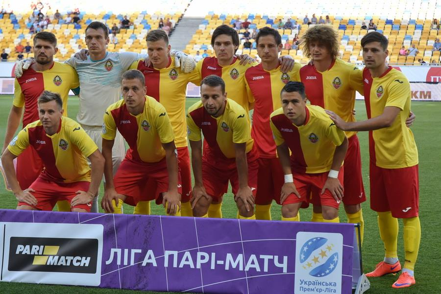 ФК Звезда Кропивницкий